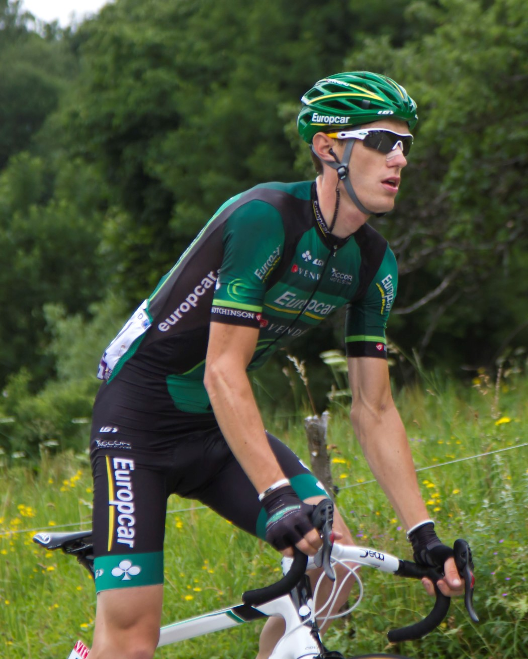 375 pierre roland